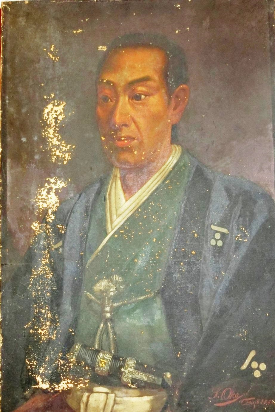 毛利元忠子爵の肖像画。